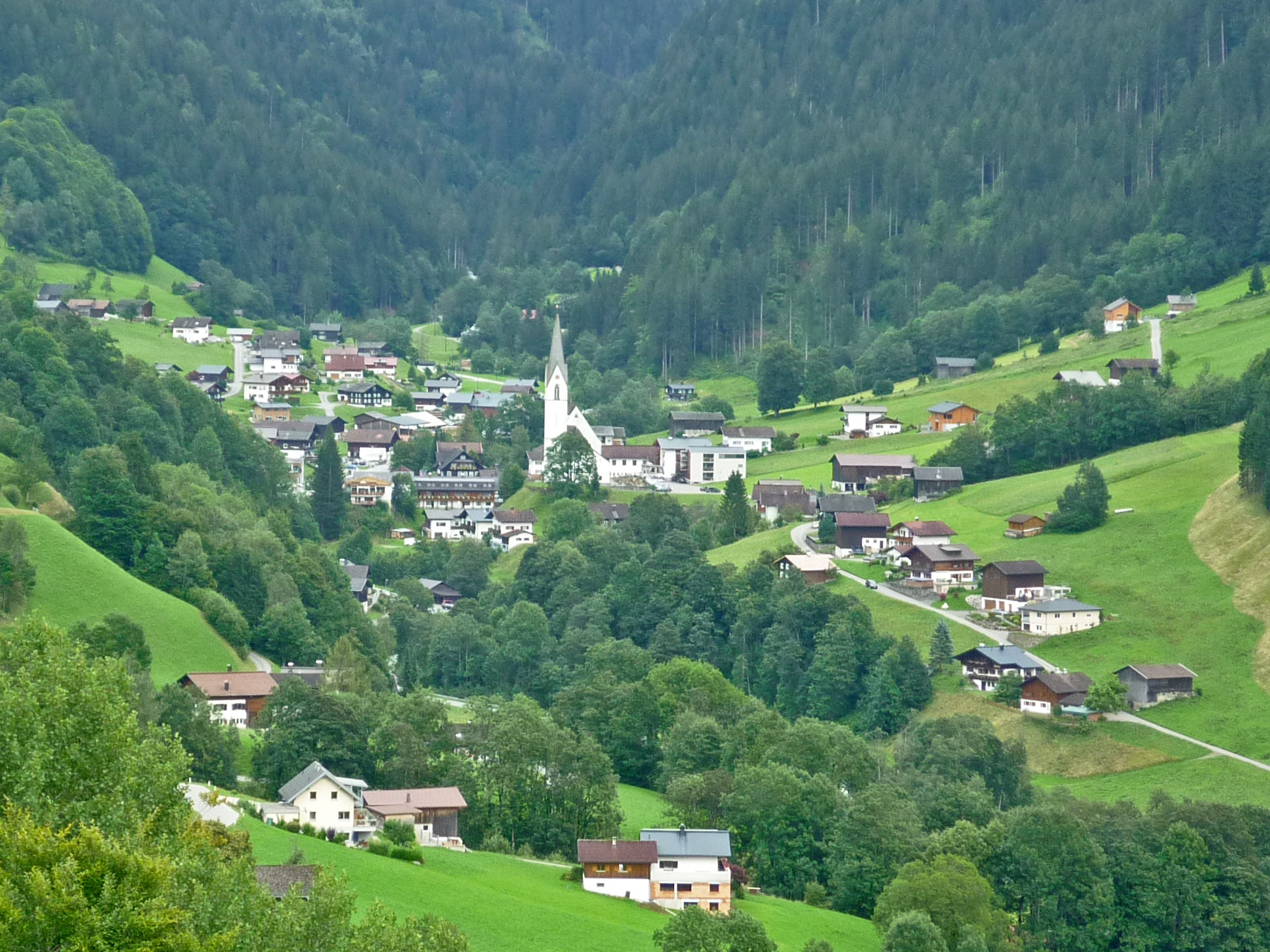 Blick auf Silbertal im Montafon